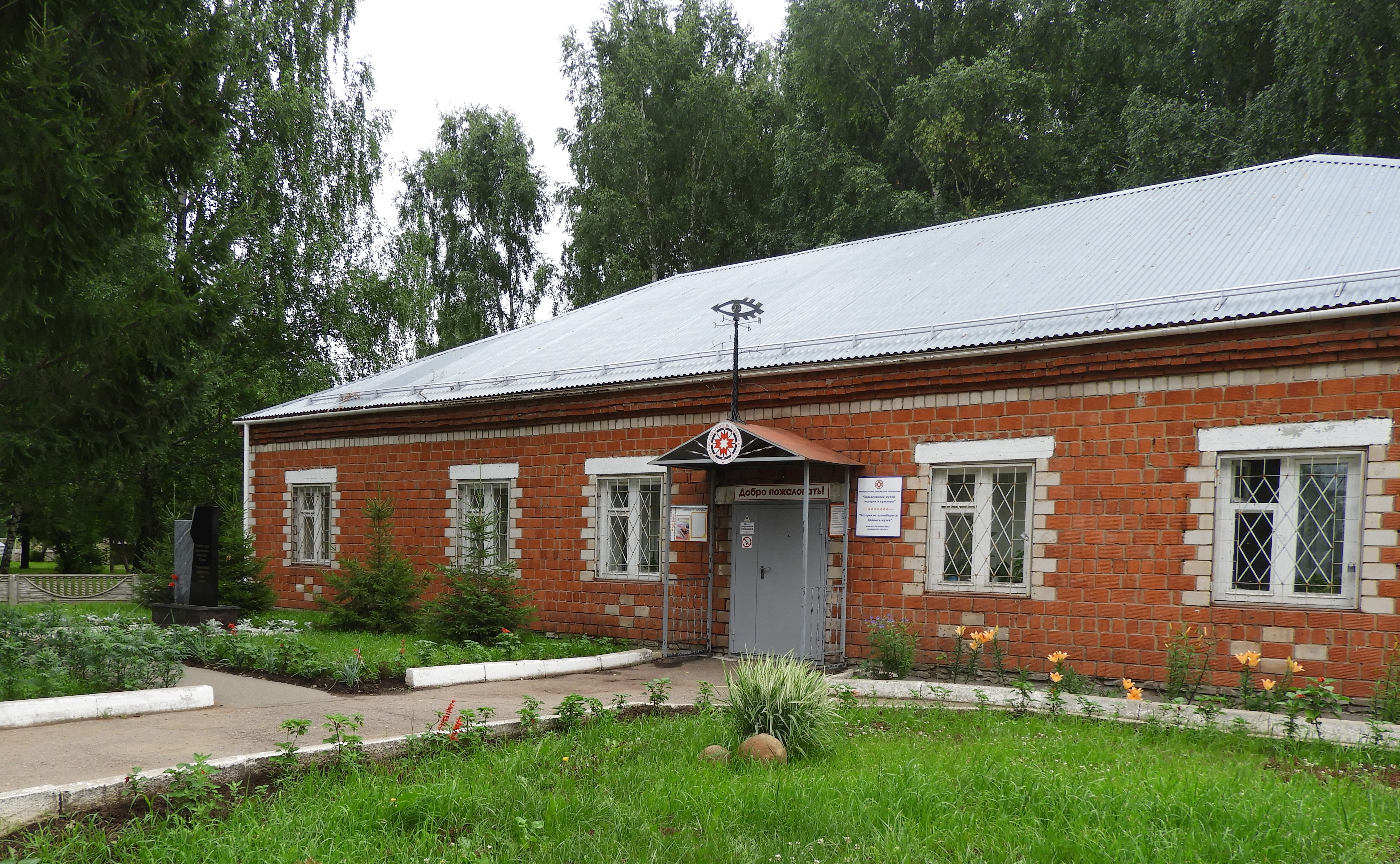 Фасад здания МБУ "Завьяловский музей истории и культуры"